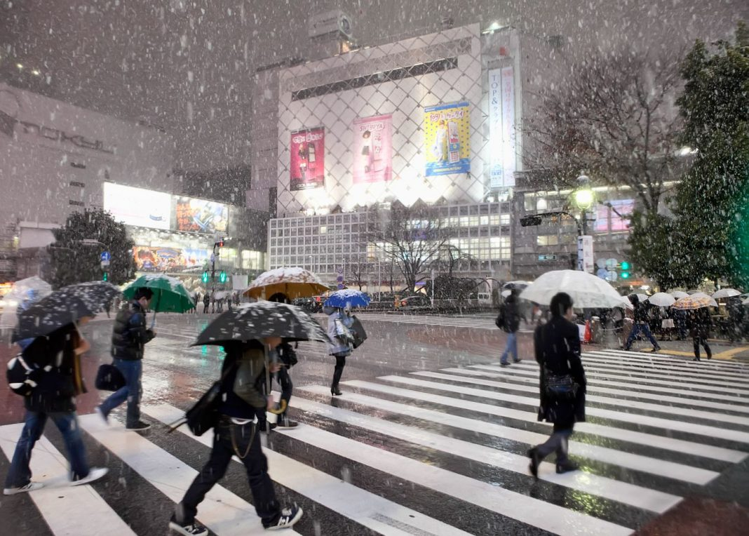 mưa ở 日本